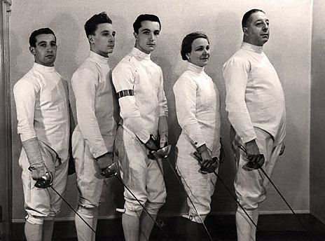 La famiglia Mangiarotti, schermidori italiani